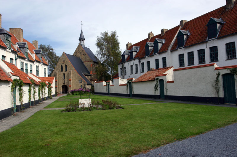 Begijnhof Diksmuide, eigen foto november 2004, hiermee onder GFDL gebracht